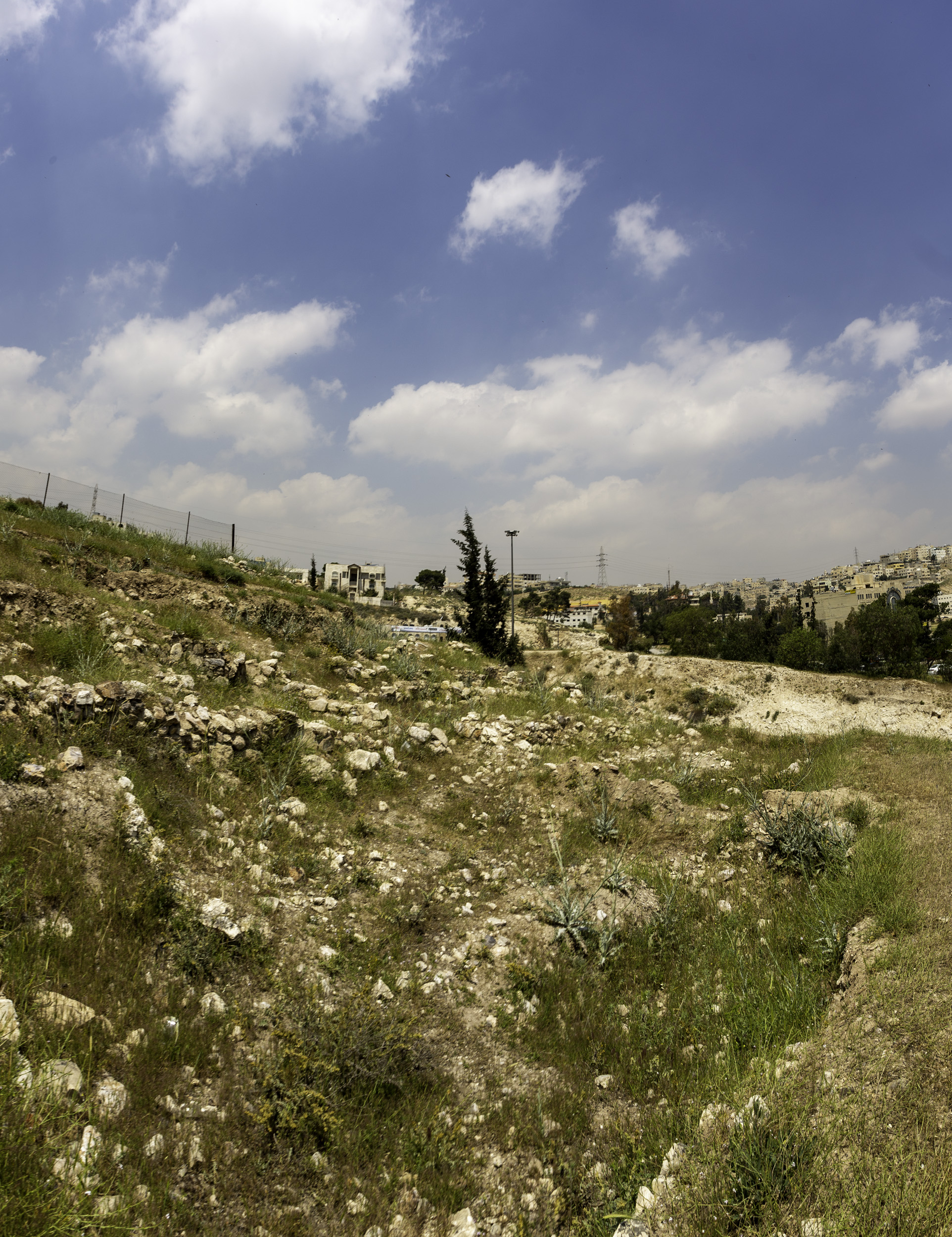 Ain Ghazal Site